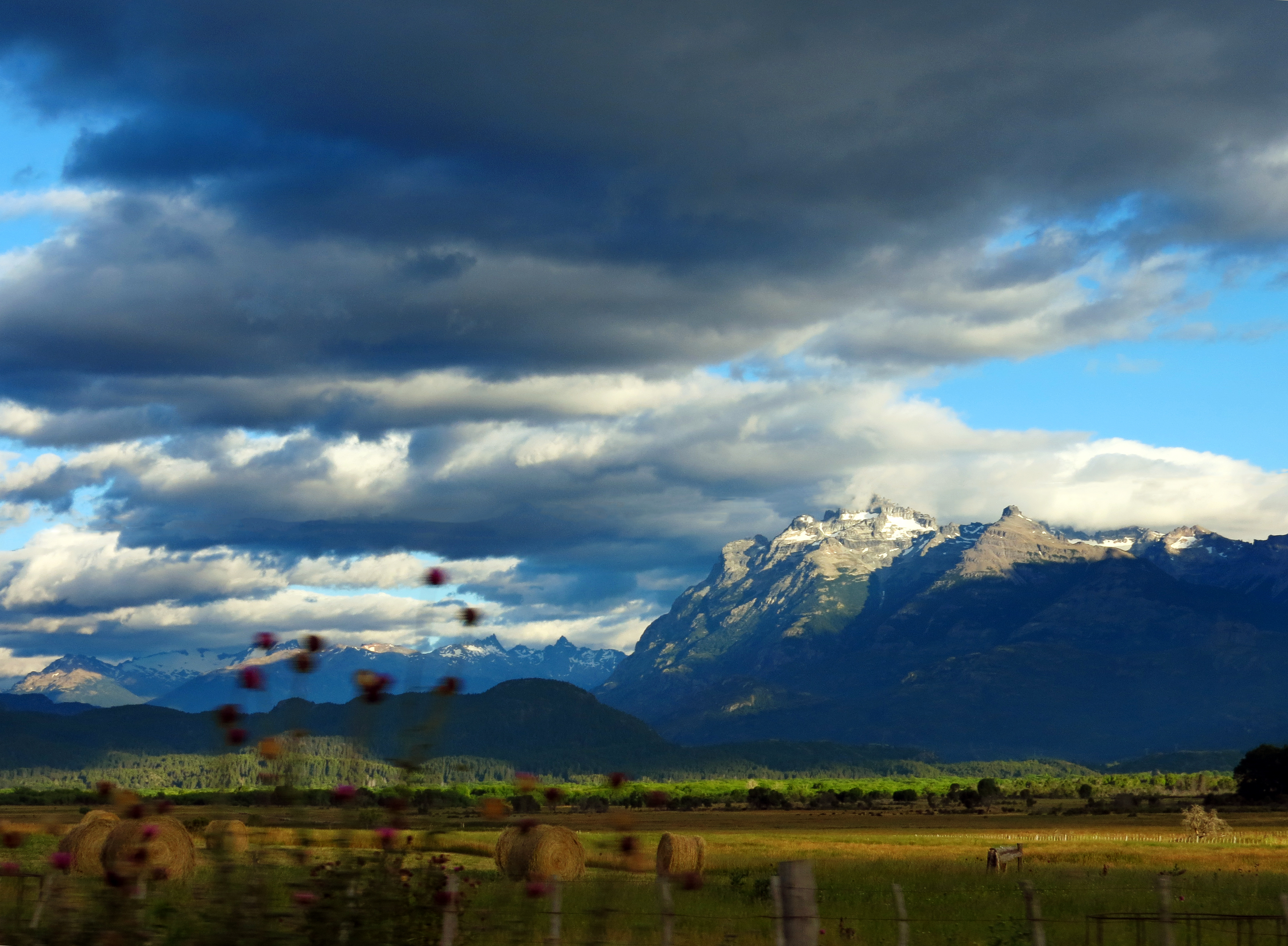 IMG_0768 / Ruta Esquel - Futaleufú